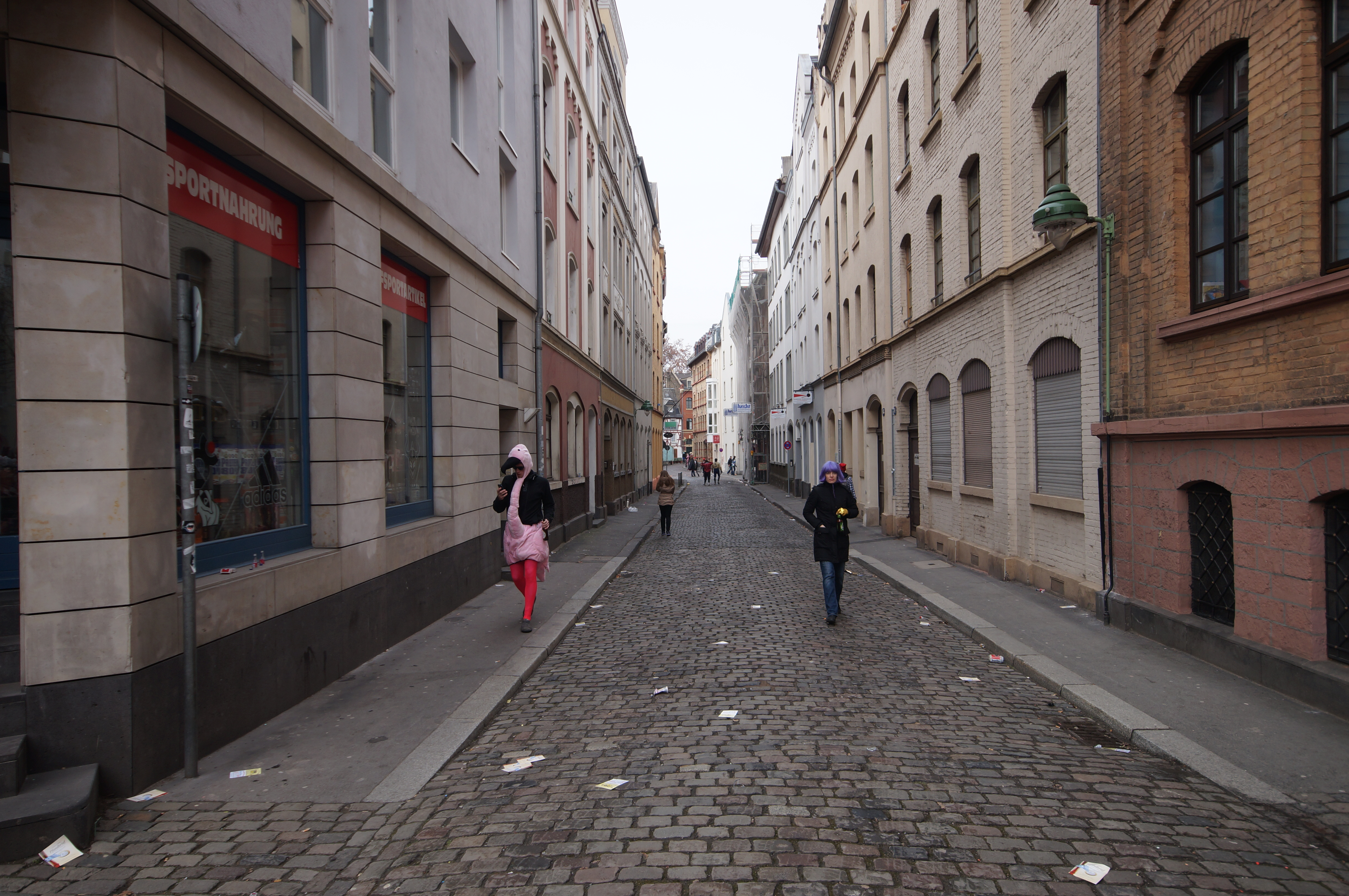 Die Schönbornstraße in Mainz-Altstadt von der Holzhofstraße Richtung Kirschgarten blickend.